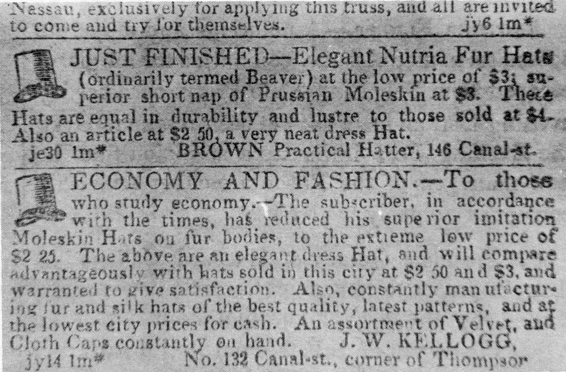 Hutangebote, Anzeigen in der New-York Daily Tribune vom 21. Juli 1843. Eines der frühen Angebote für Hüte aus Nutria- anstelle Biberhaar.